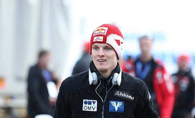 Konkurs drużynowy mężczyzn na skoczni K-120